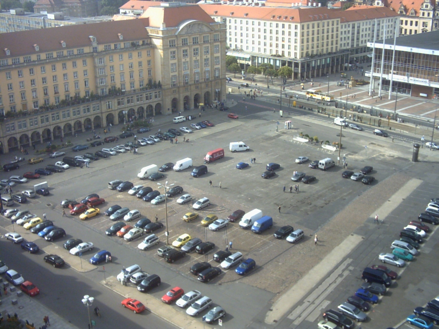 Altmarkt in Dresden/Germany